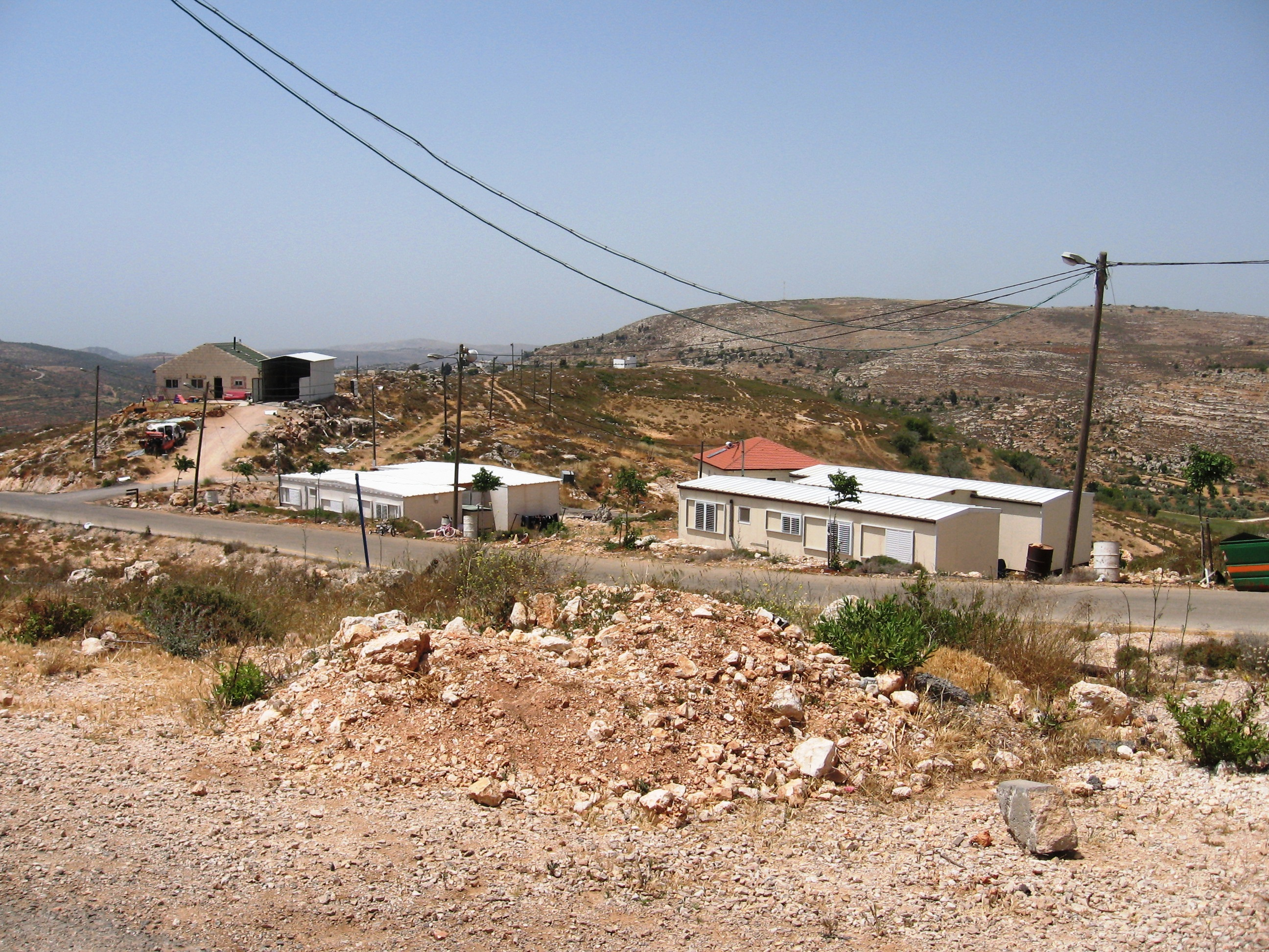 Ahijah Panorama to NORD